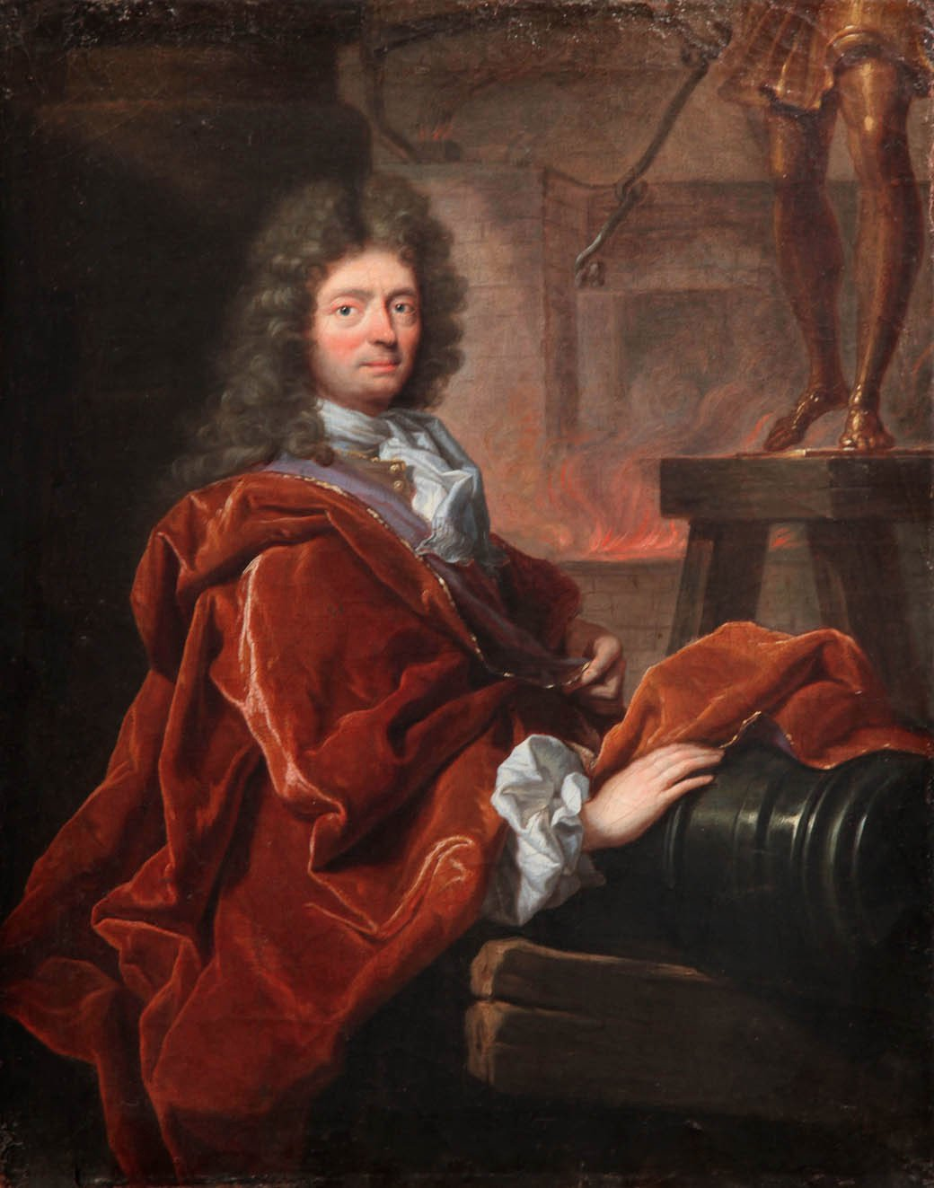 Der Zücher Erzgiesser Balthssar Keller, Gemälde von Hyacinthe Rigaud um 1685